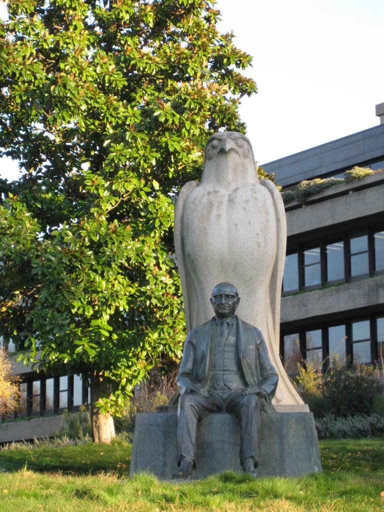 արձանը թանգարանի դիմաց